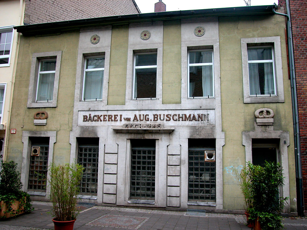 Bäckerei von Aug. Buschmann, Akademiestraße, Düsseldorf-Altstadt